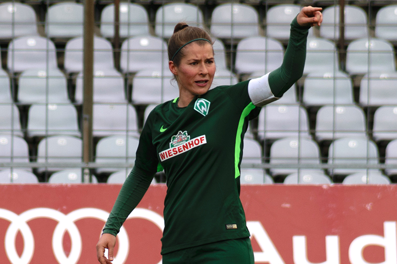 Gabriella Tóth